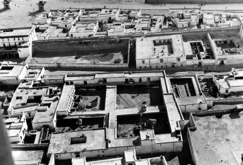 Lhasa, Wirtschaftsgebäude des Potala